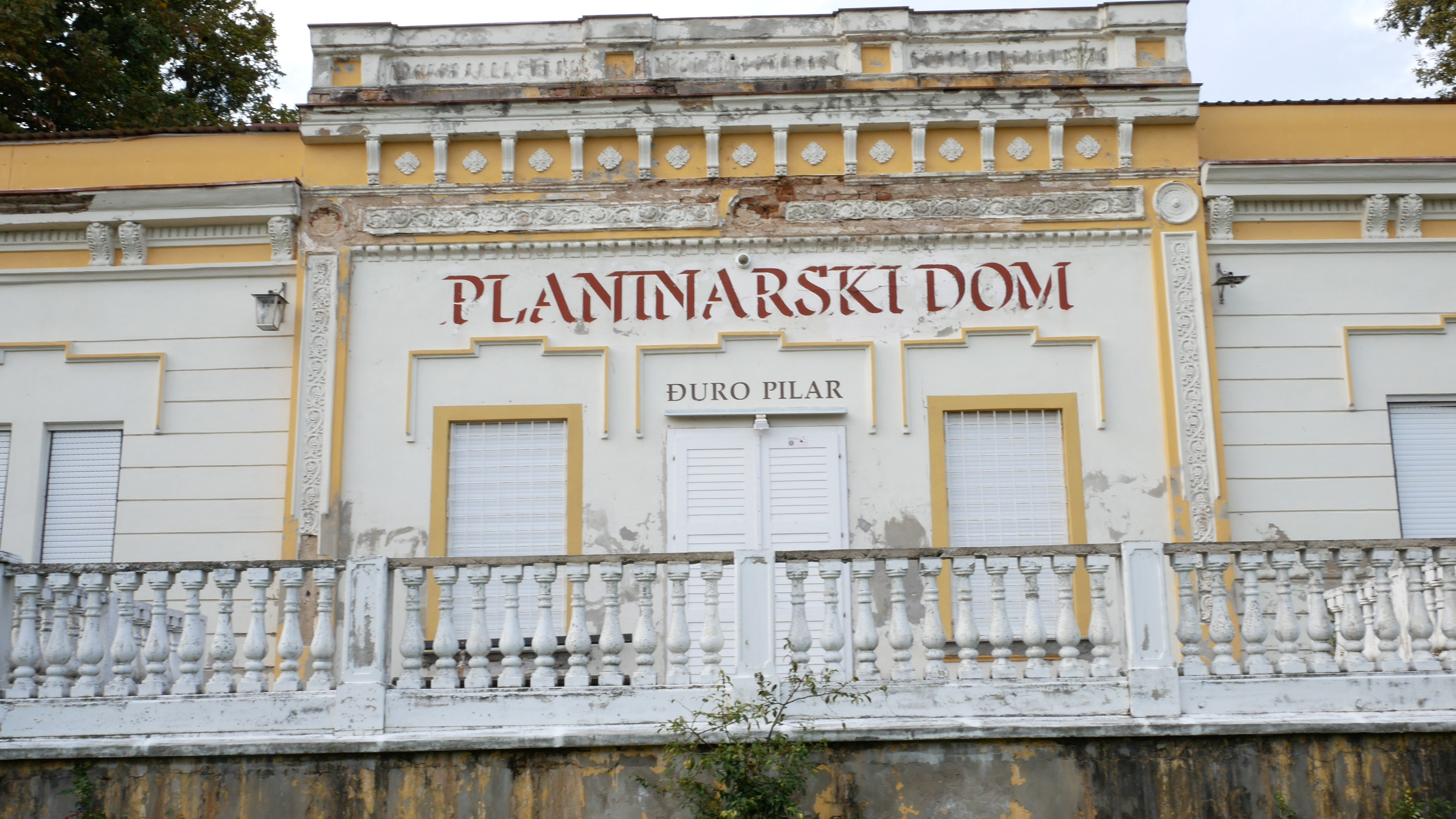 Planinarski dom Đuro Pilar u Slavonskom Brodu